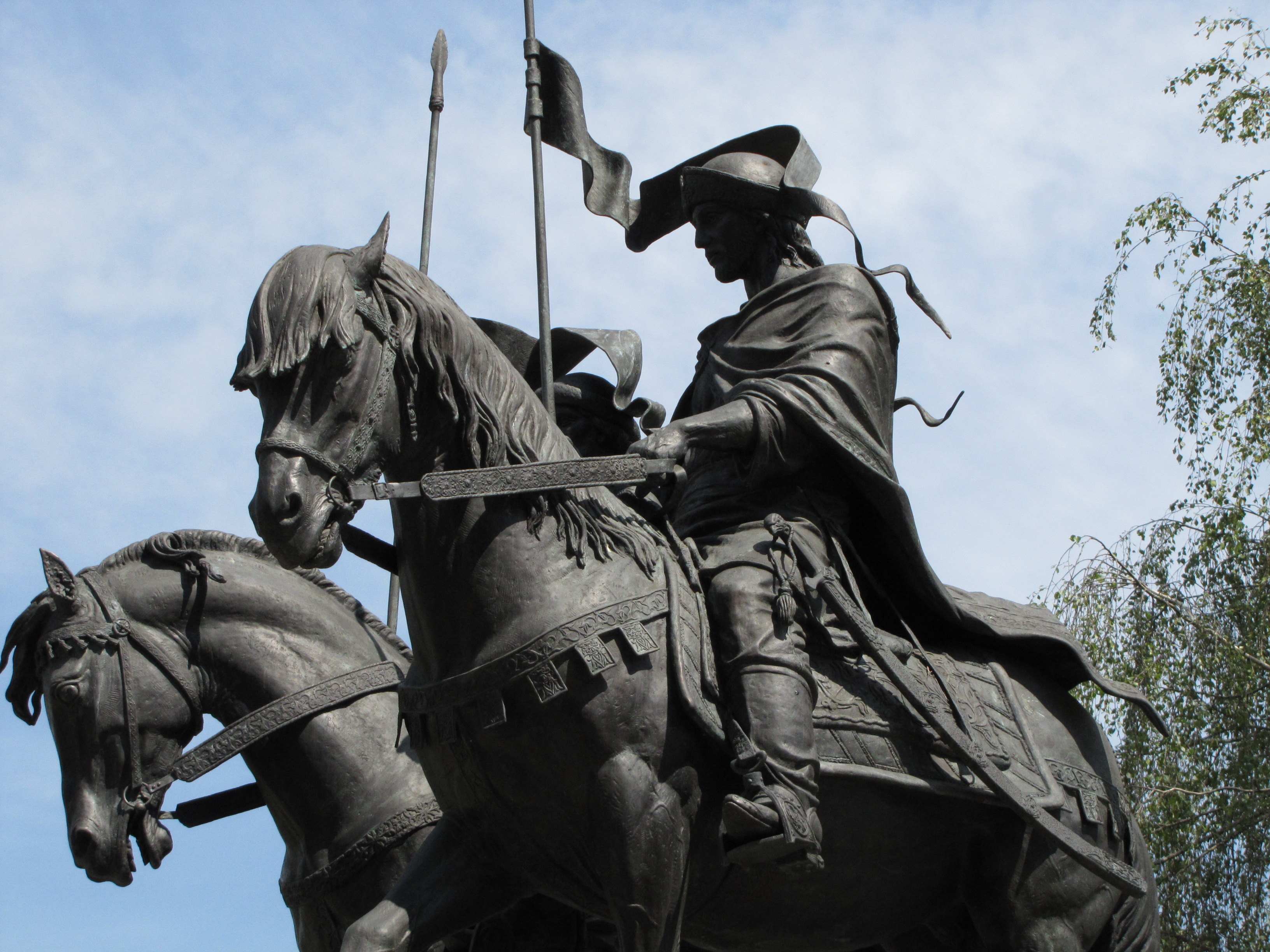 Дмитров, памятник Борису и Глебу у Борисоглебского монастыря